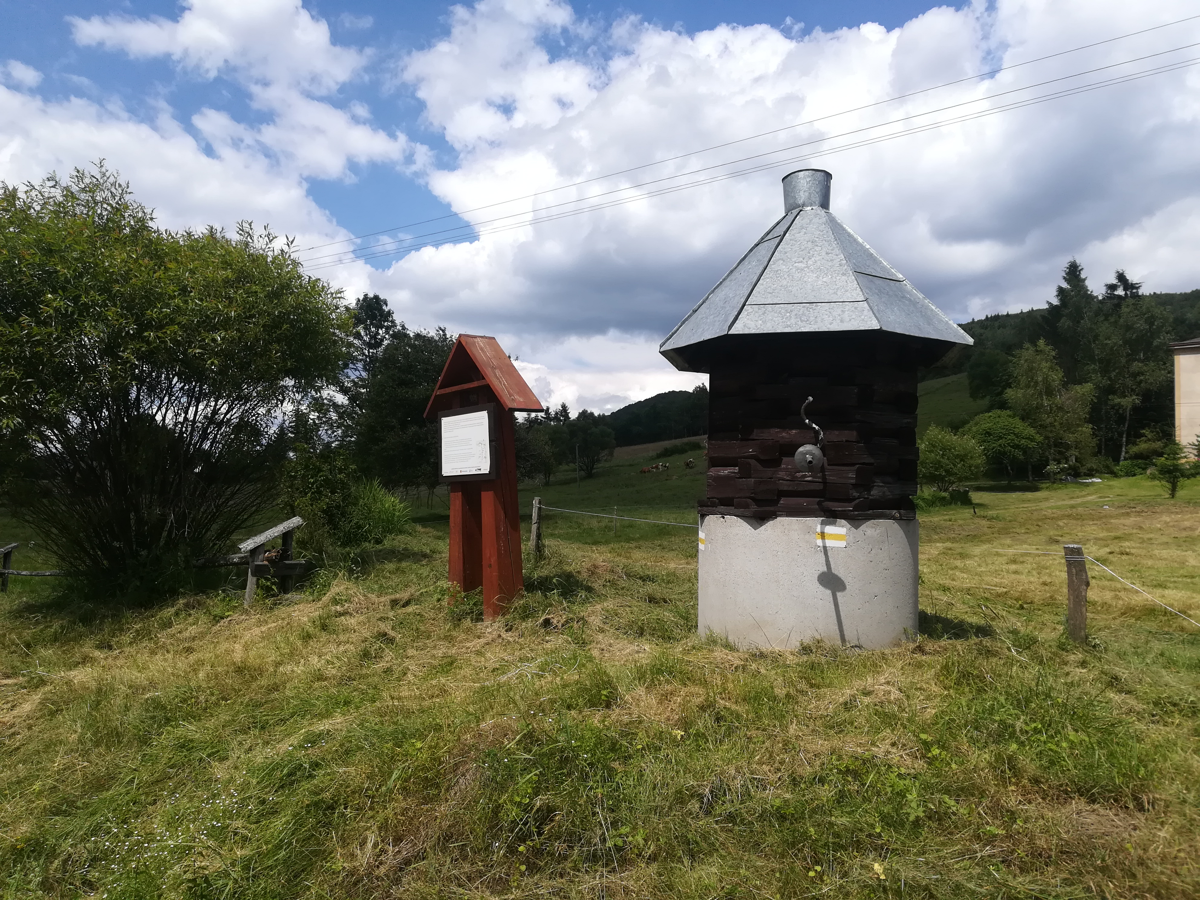 Krajobraz ze wsi Blechnarka w Beskidzie Niskim.